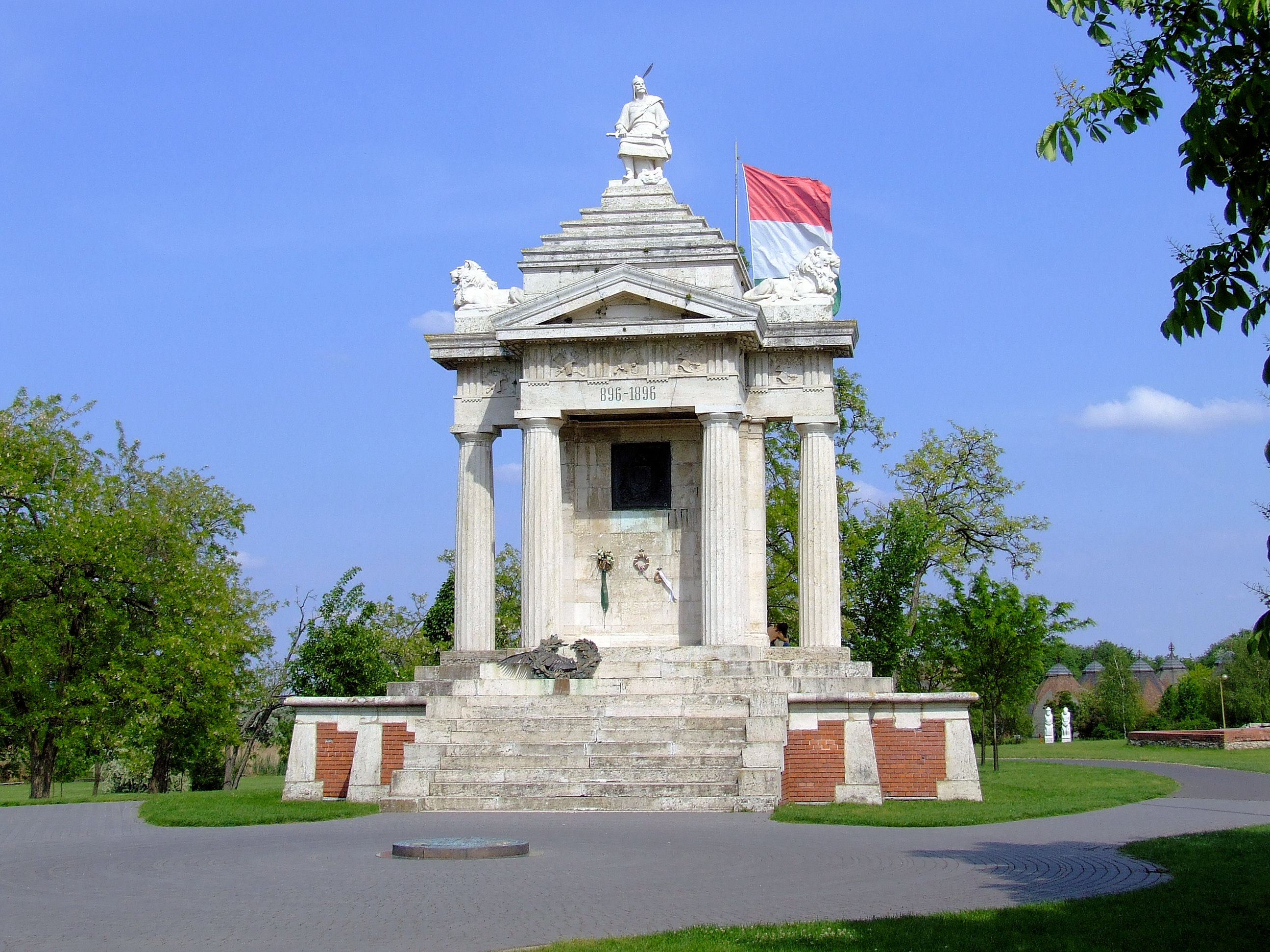 Az Árpád-emlékmű Ópusztaszeren. Berczik Gyula építész és Kallós Ede szobrászművész alkotása. A szobrot 1996-ban Buzál Károly faragta újra.